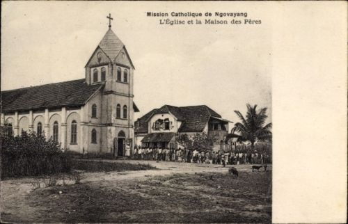 Mission catholique de Ngovayang en 1929.